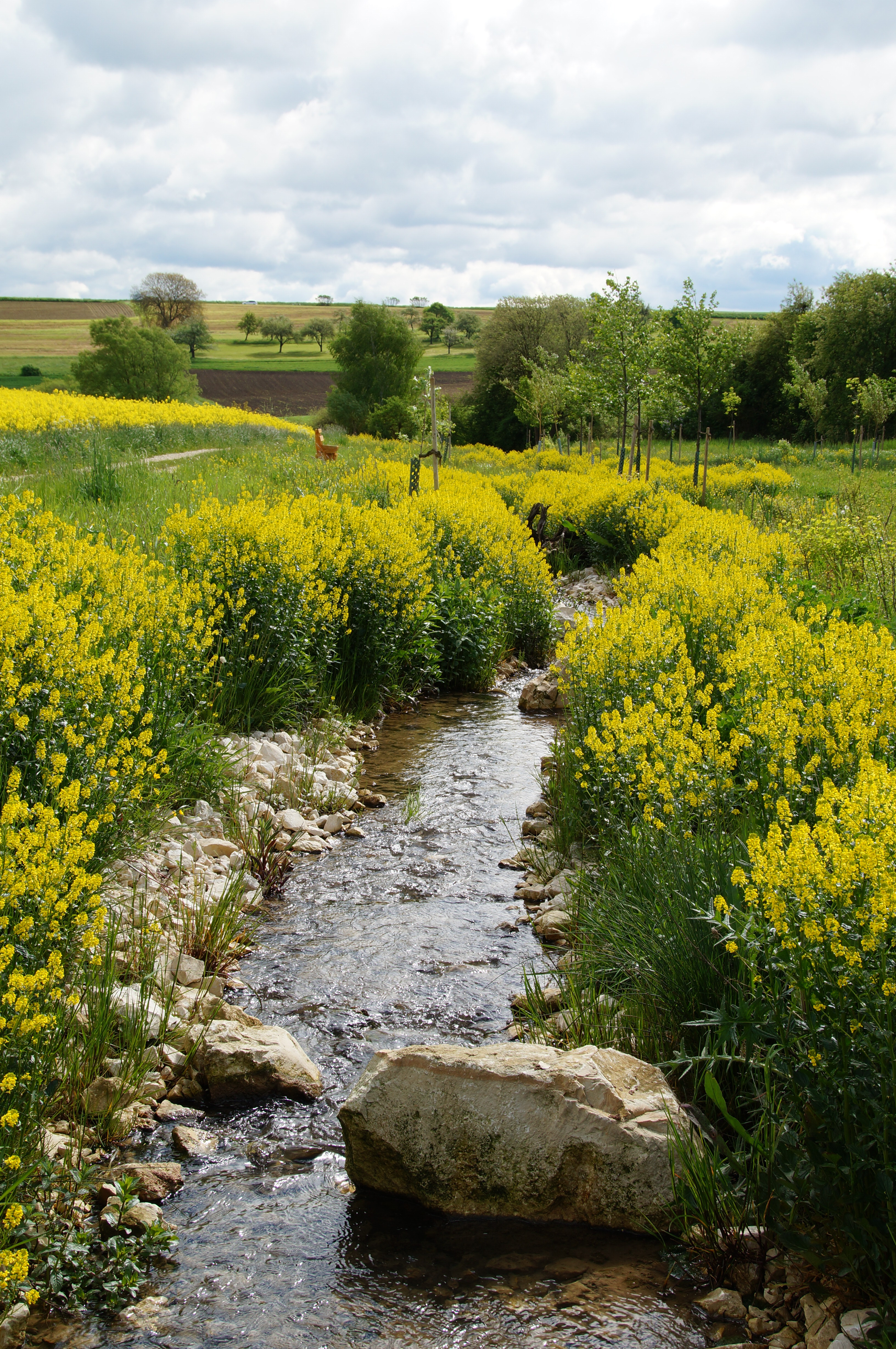 Göttingen Stipfbach 2013